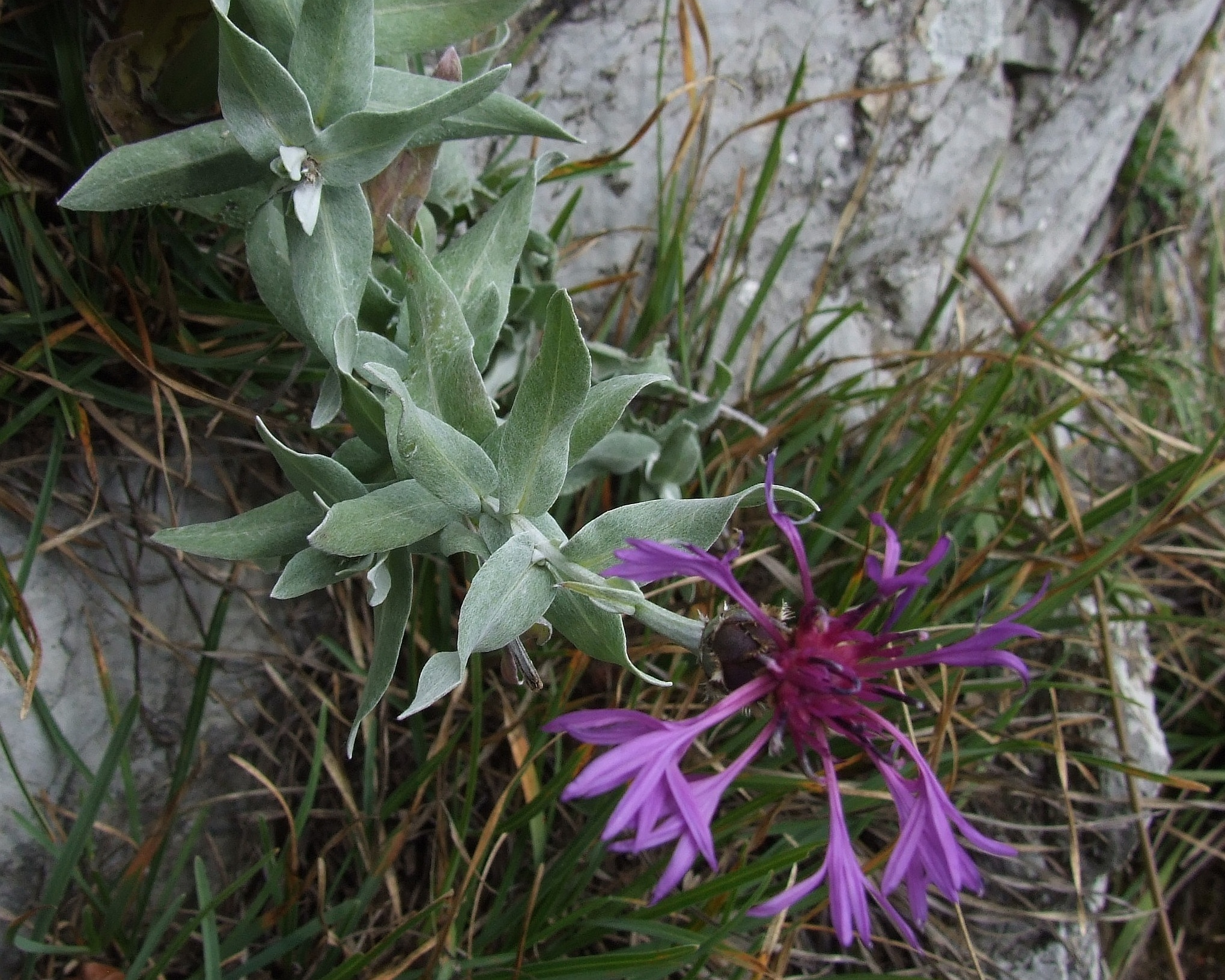 Centaurea triumfettii (habitat:Pieniny)